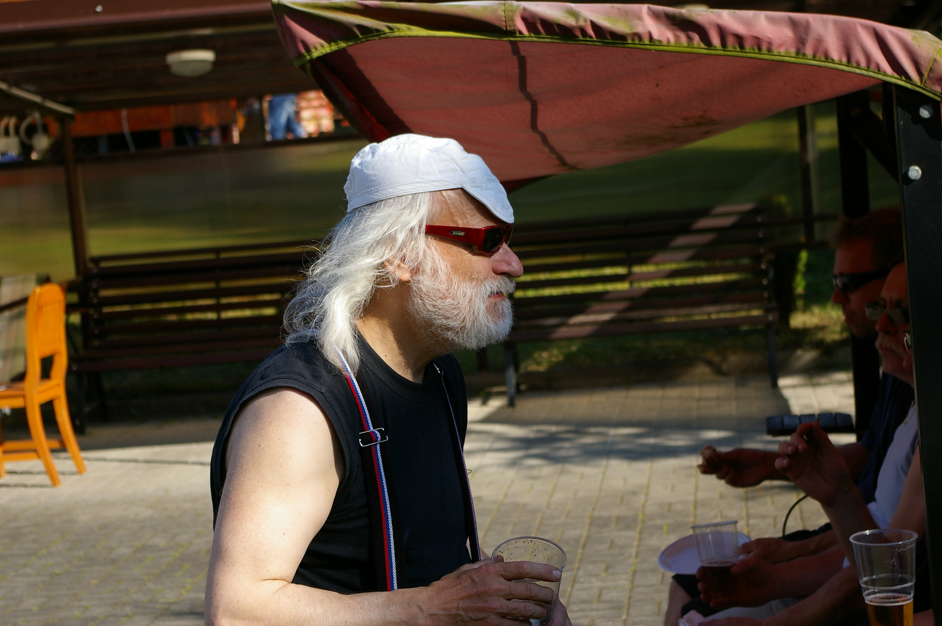 120616_Jesenice_Alexander_Sasa_Pleska